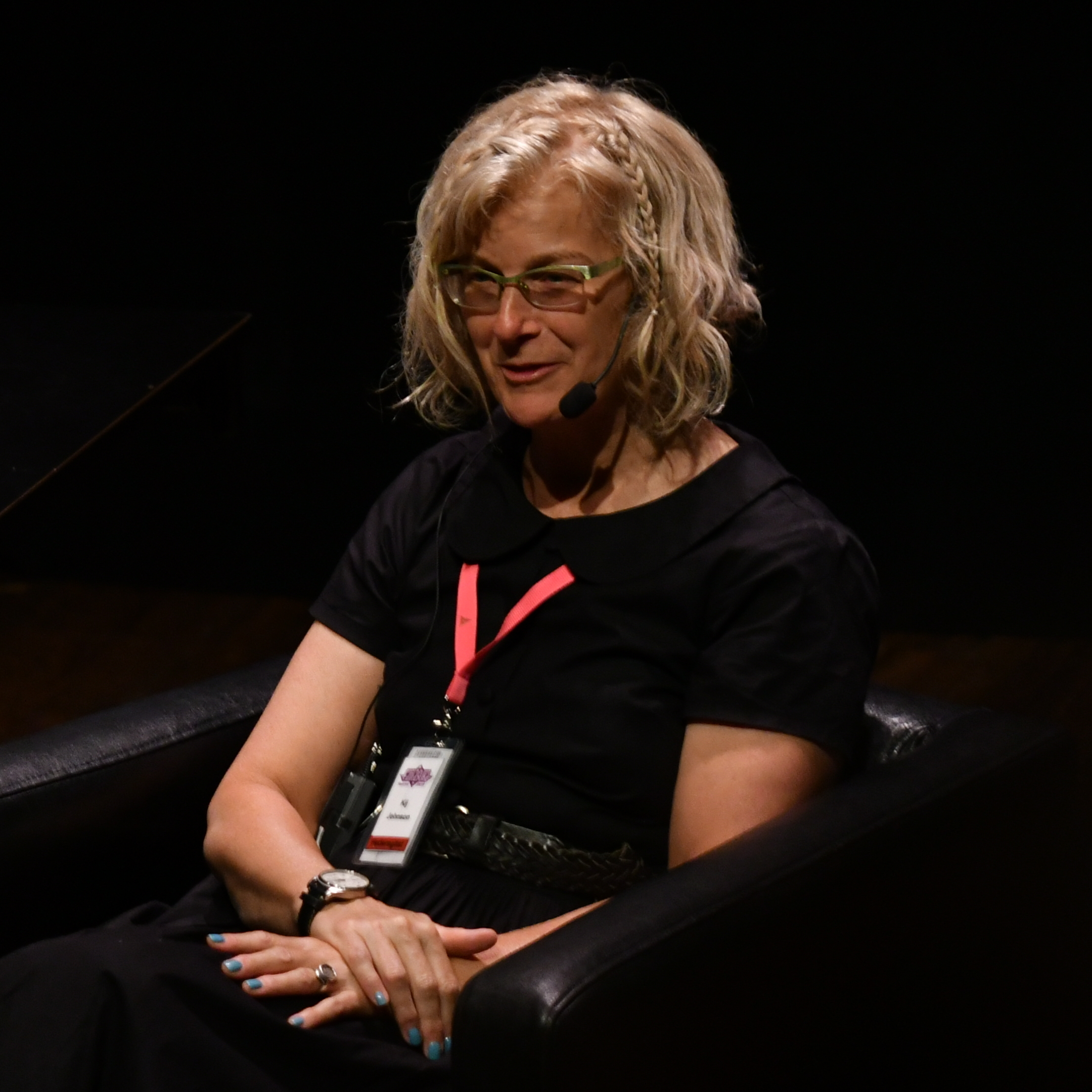 Flemming Rasch intervjuar Kij Johnson på Fantastika 2018, Swecon 2018.